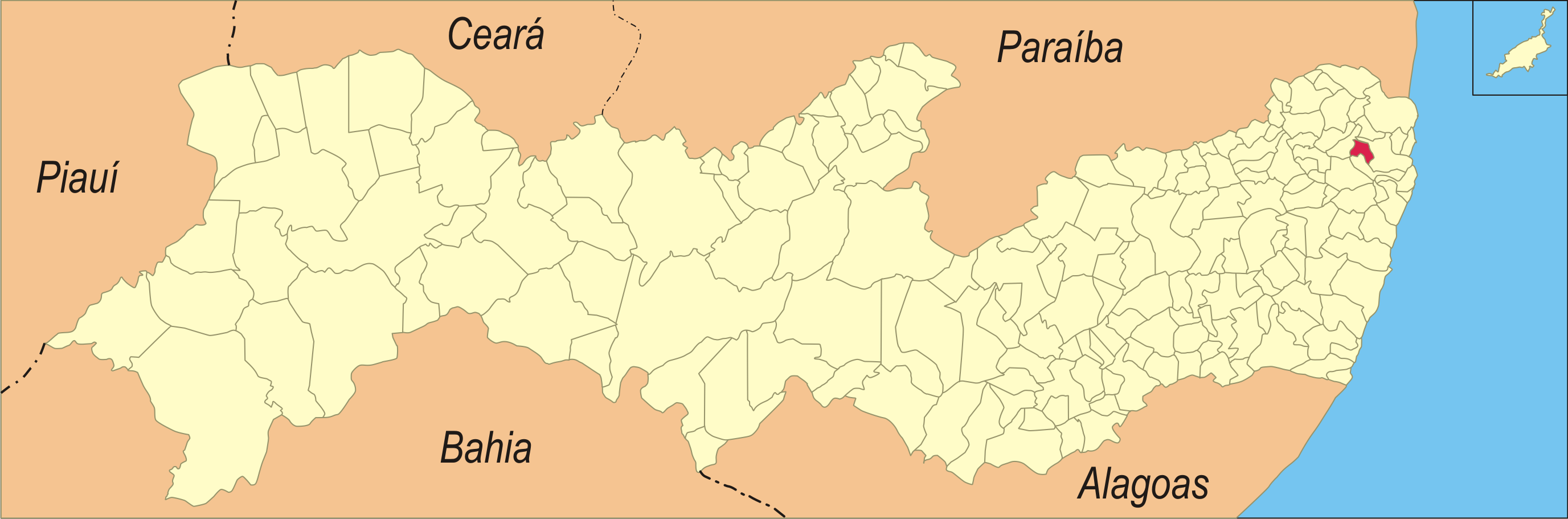 Localização da cidade no estado de Pernambuco